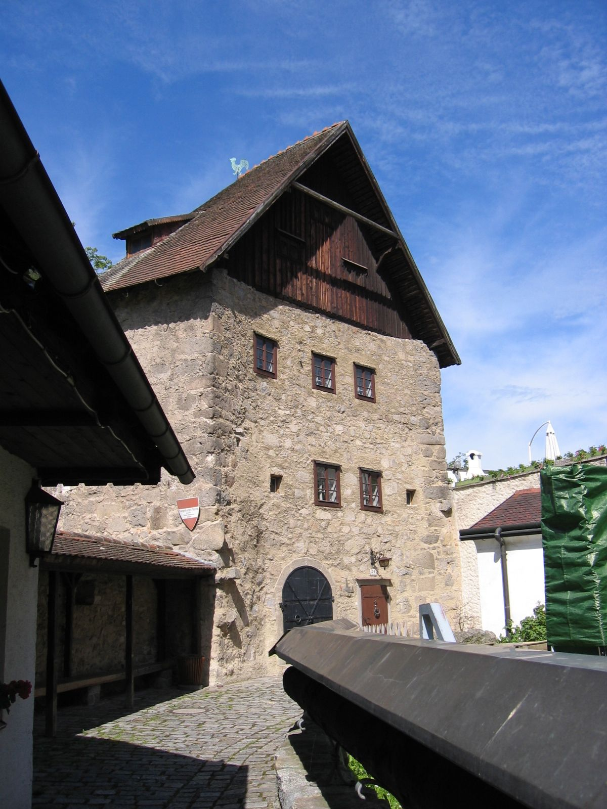 Eingang zum Bürgerkorpsturm